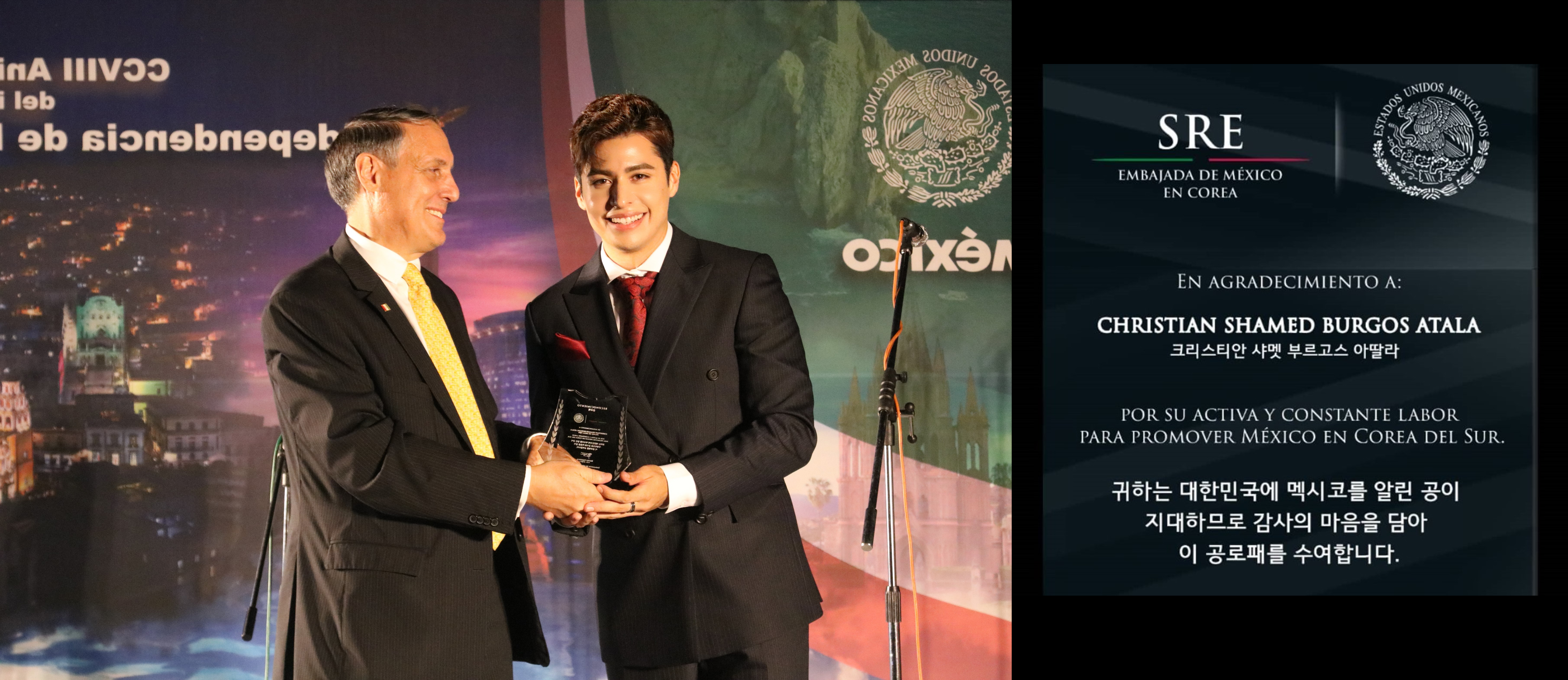 christian burgos bruno figueroa